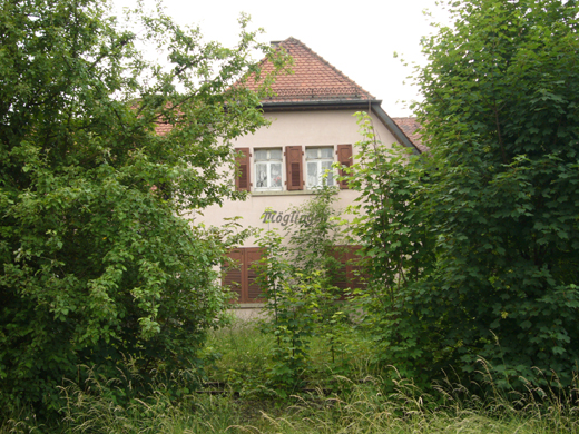 Bahnhof in Möglingen